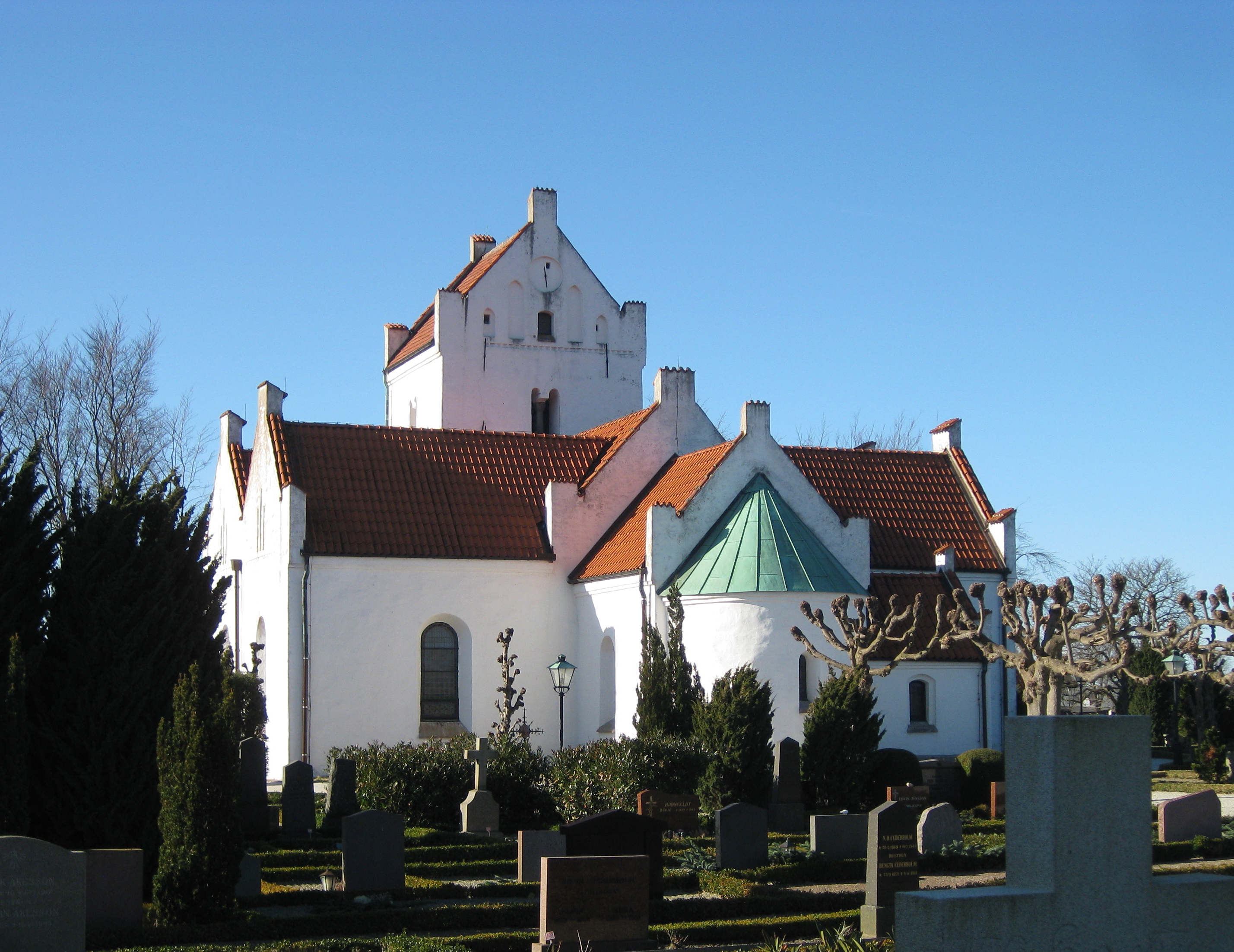 Vallkärra kyrka i Skåne